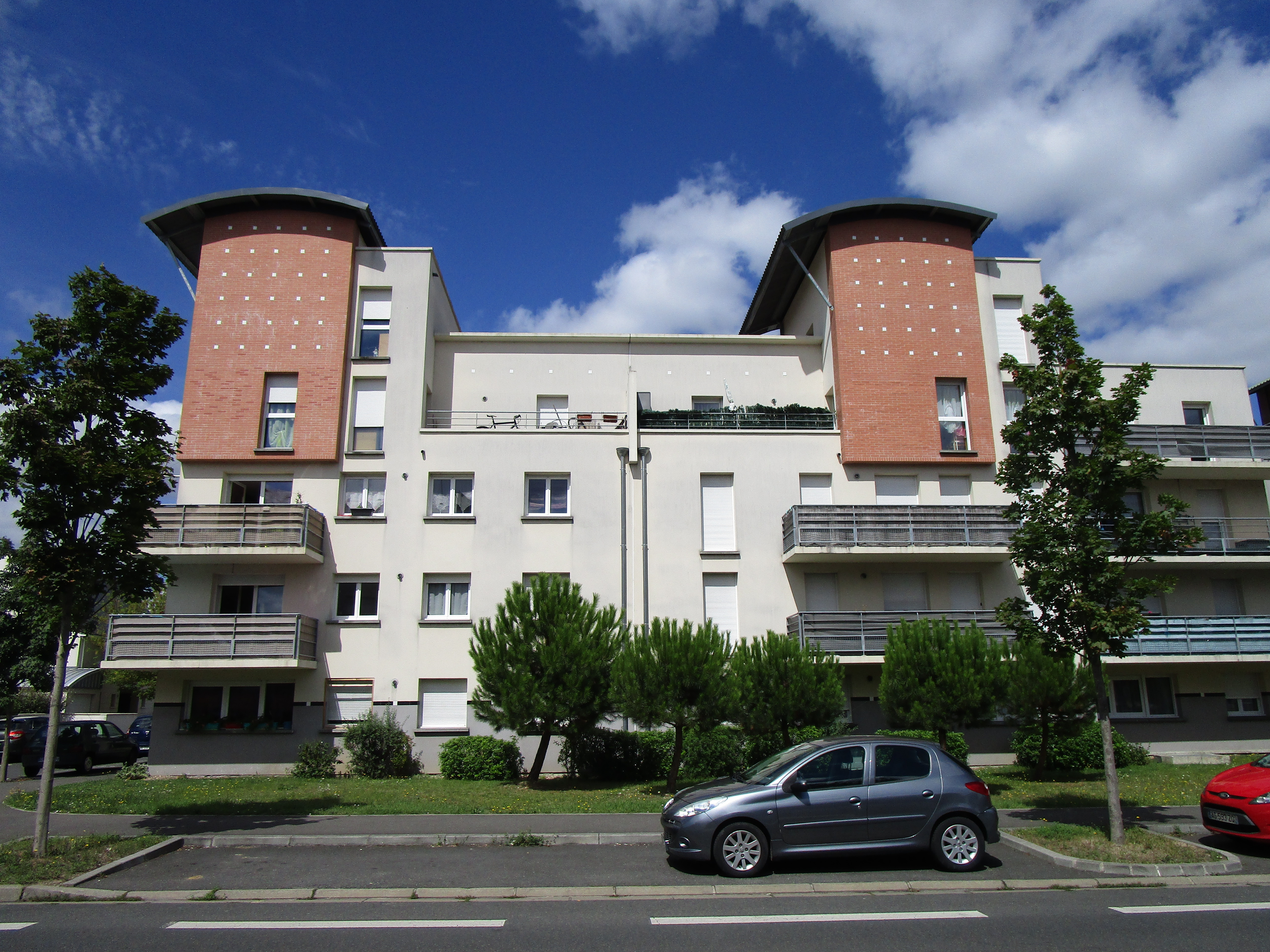 Vue la résidence Celsius sur l'avenue Michelin, dans le quartier des Deux-Lions à Tours. Construit en 2008 avec 24 logements pour le bailleur social Maryse Bastié.